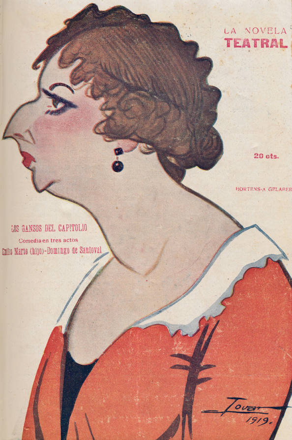 Caricatura de Hortensia Gelabert.